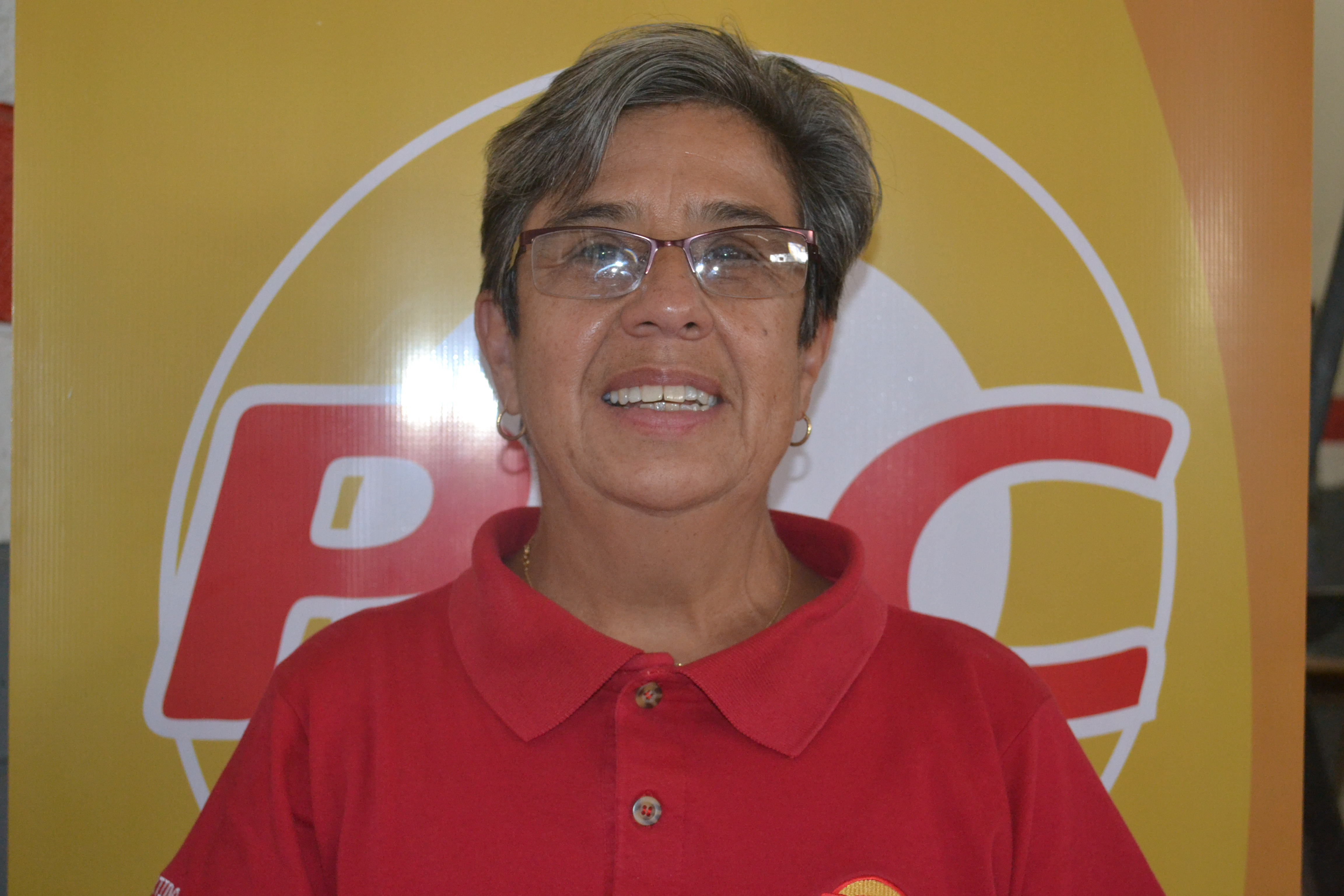 Margarita Bolaños, presidenta PAC